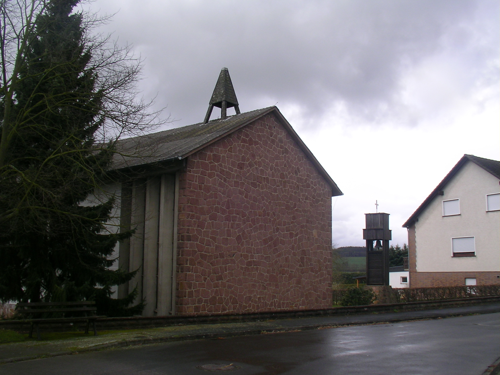 Ehemalige katholische Kirche in Borken-Nassenerfurth.